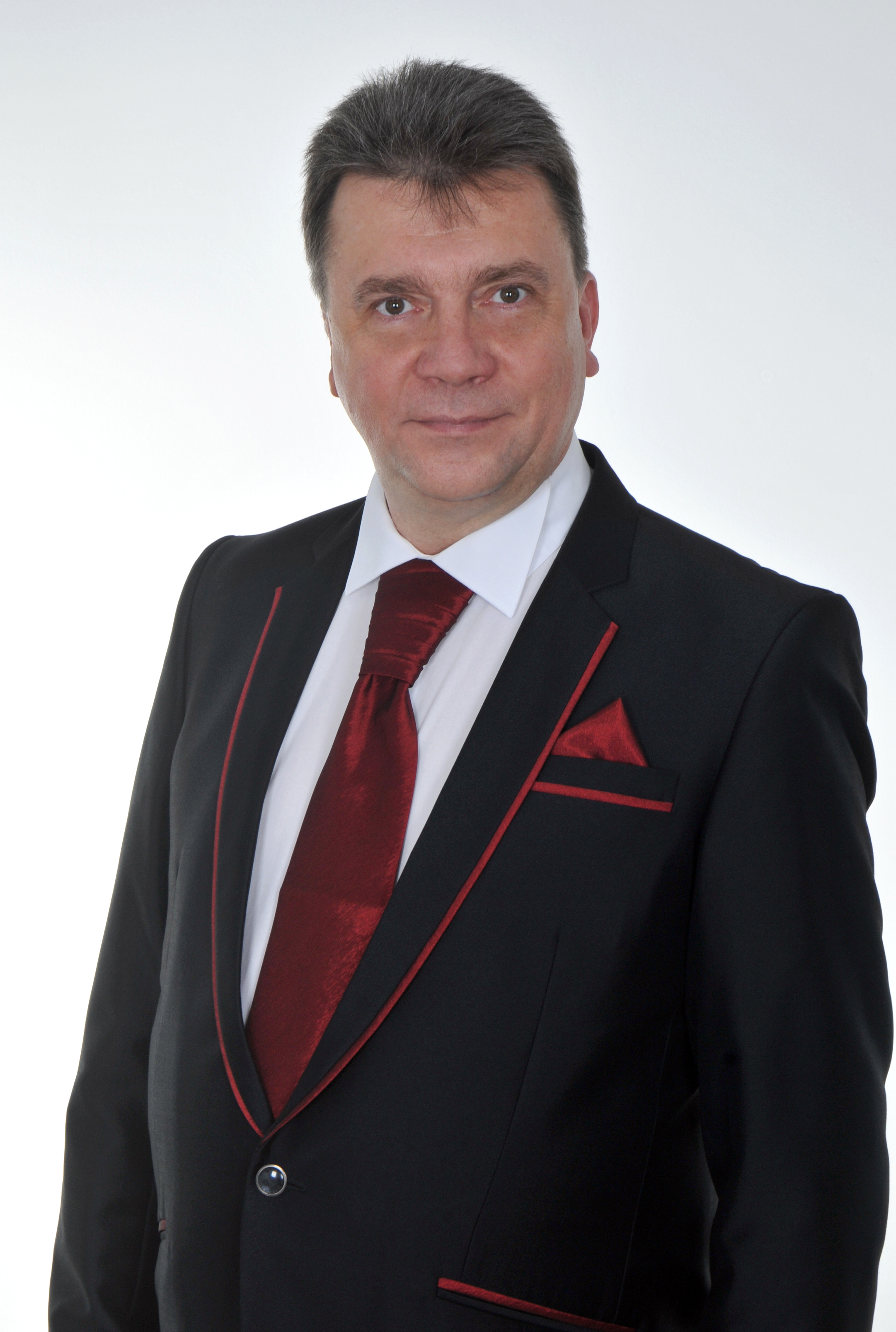 ks. Zbigniew Stępniak w stroju koncertowym